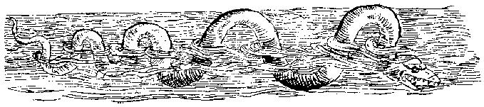 Sea serpent. From Konrad Gesner's Nomenclator aquafilium animantium